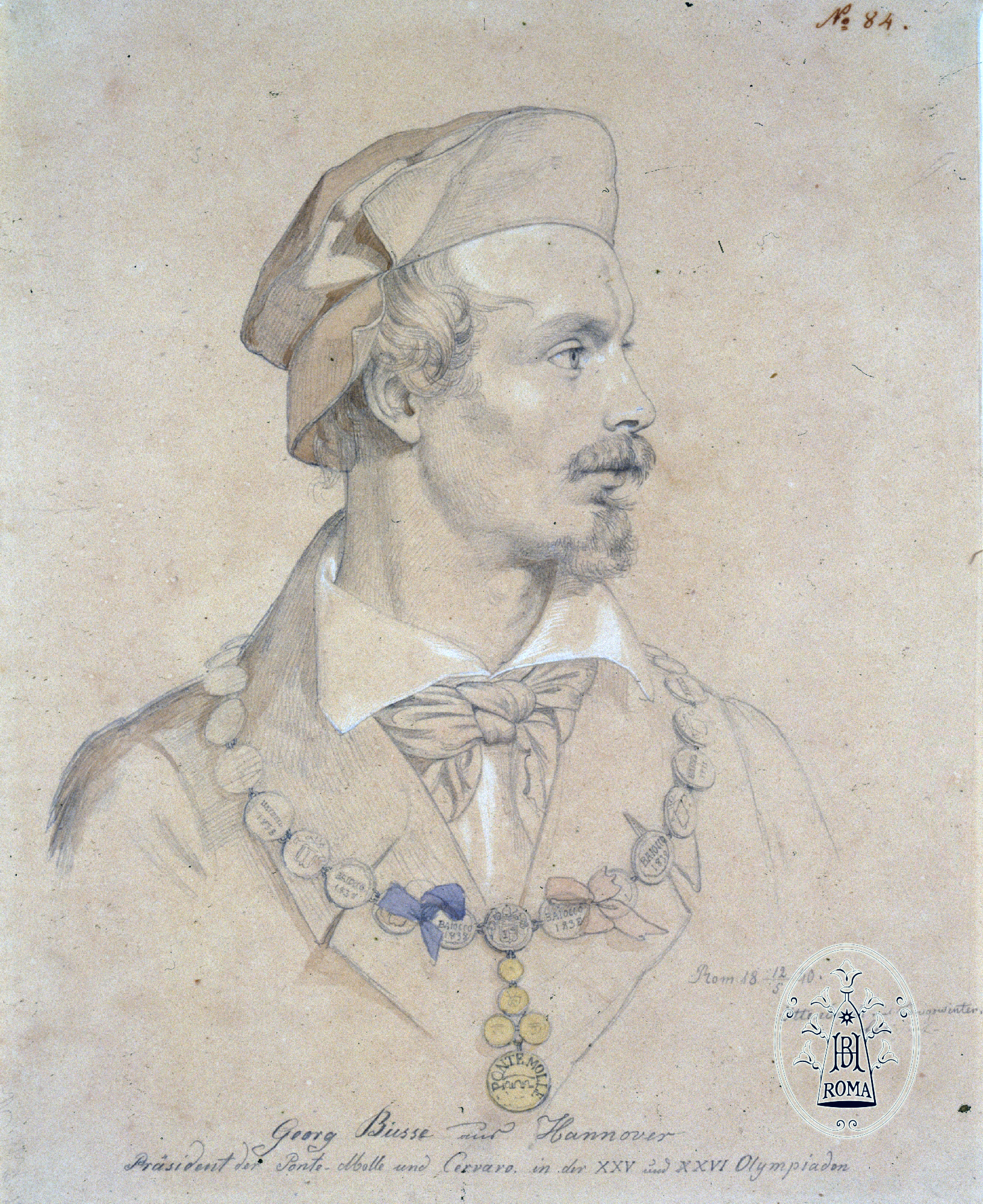 Porträt Georg Heinrich Busse als Präsident der Ponte-Molle und Cervaro in der XXV. (1838) und XXVI. (1839) Olympiade, gezeichnet von Franz Ittenbach, Rom 1840